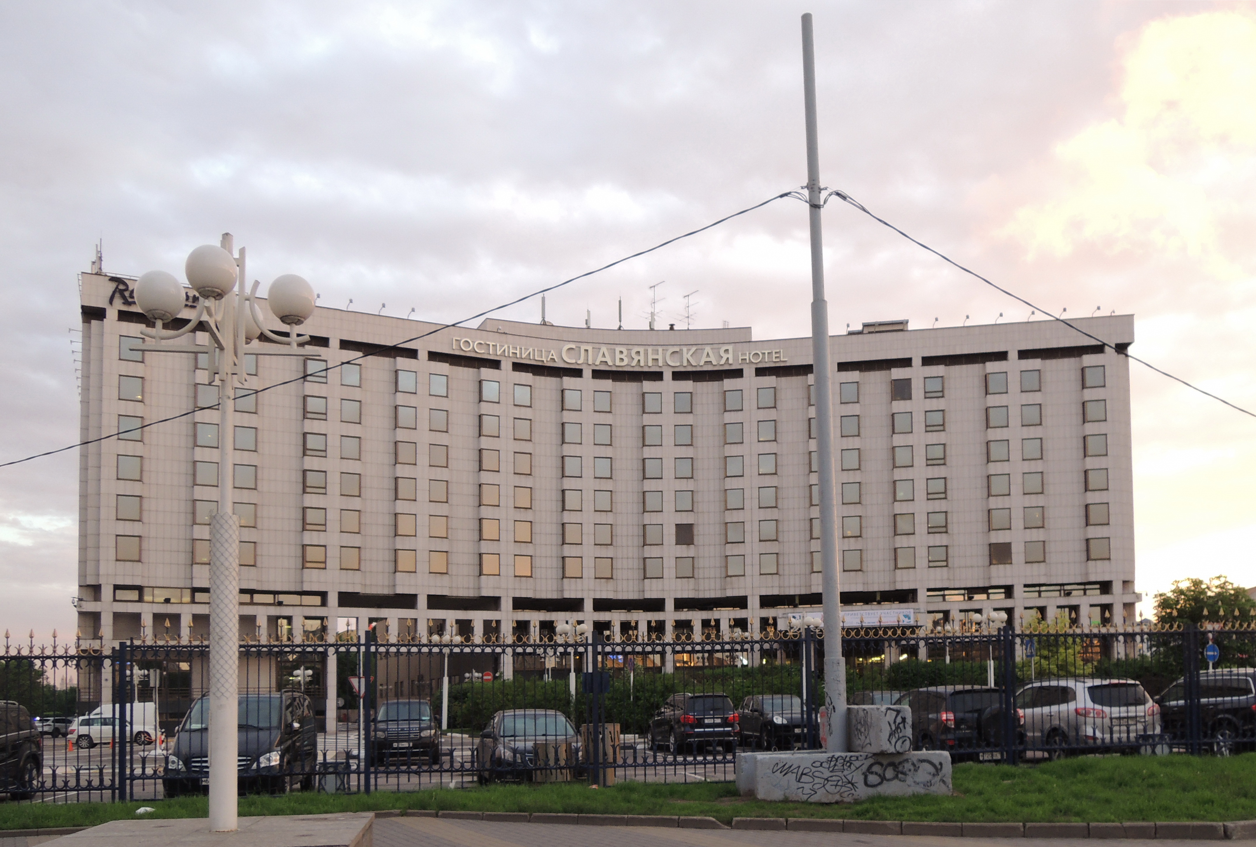 Рэдиссон Славянская Построена по проекту архитектора Виталия Соколова, введена в эксплуатацию в ноябре 1990 года и приняла первых гостей в августе 1991 года. В 2003 году в отеле была проведена капитальная реконструкция. Занимает участок в 3,8 га на Бережковской набережной в центре Москвы. Общая площадь гостиницы — 60,5 тыс. кв. м, в восьмиэтажном здании расположены 427 номеров (включая 20 люксов и один президентский люкс), четыре ресторана, фитнес-центр с бассейном, торговый пассаж, деловой центр из 14 конференц-залов, вмещающих до 1,5 тыс. человек. Неоднократно признавалась "Лучшей гостиницей Radisson Hotel Corp. за пределами США". Управление гостиницей изначально осуществляло совместное предприятие "Интурист РадАмер — гостиница и деловой центр", учредителями которого на паритетных началах выступили Госкомитет по иностранному туризму СССР и американская фирма RadAmer. Последняя была учреждена одним из лидеров мирового гостиничного бизнеса компанией Radisson (управляла гостиницей) и компанией Americom (управляла деловым центром). В 1992 году доля Госкоминтуриста перешла к Москомимуществу. В 1996 году вокруг гостиницы разгорелся конфликт: глава Americom Пол Тейтум утверждал, что гендиректор СП Умар Джабраилов незаконно занимает свой пост и что возглавлять предприятие, согласно уставным документам, должен представитель американской стороны. Кроме того, господин Тейтум утверждал, что в его адрес поступали угрозы со стороны господина Джабраилова. 3 ноября 1996 года Пол Тейтум был убит, это преступление так и не раскрыто. В 2002 году договор на аренду гостиницы до 2053 года с правительством Москвы заключило ООО "Славянская гостиница и деловой центр" (50% принадлежит правительству Москвы, еще 50% — ООО "Отель-Инвест"). Подробнее